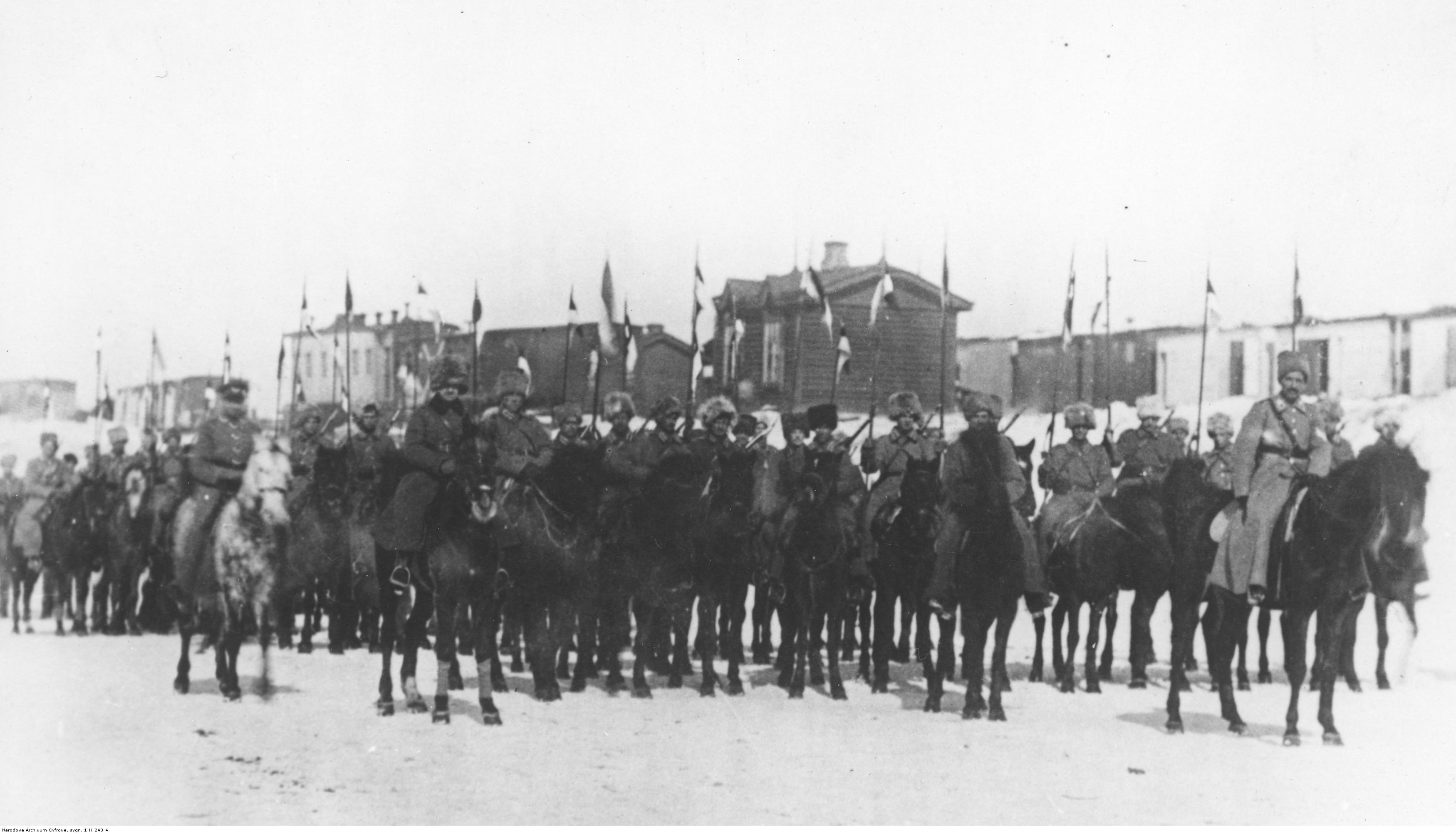 1 Szwadron Ułanów 5 Dywizji Strzelców Polskich w Nowonikołajewsku (obecnie Nowosybirsk)